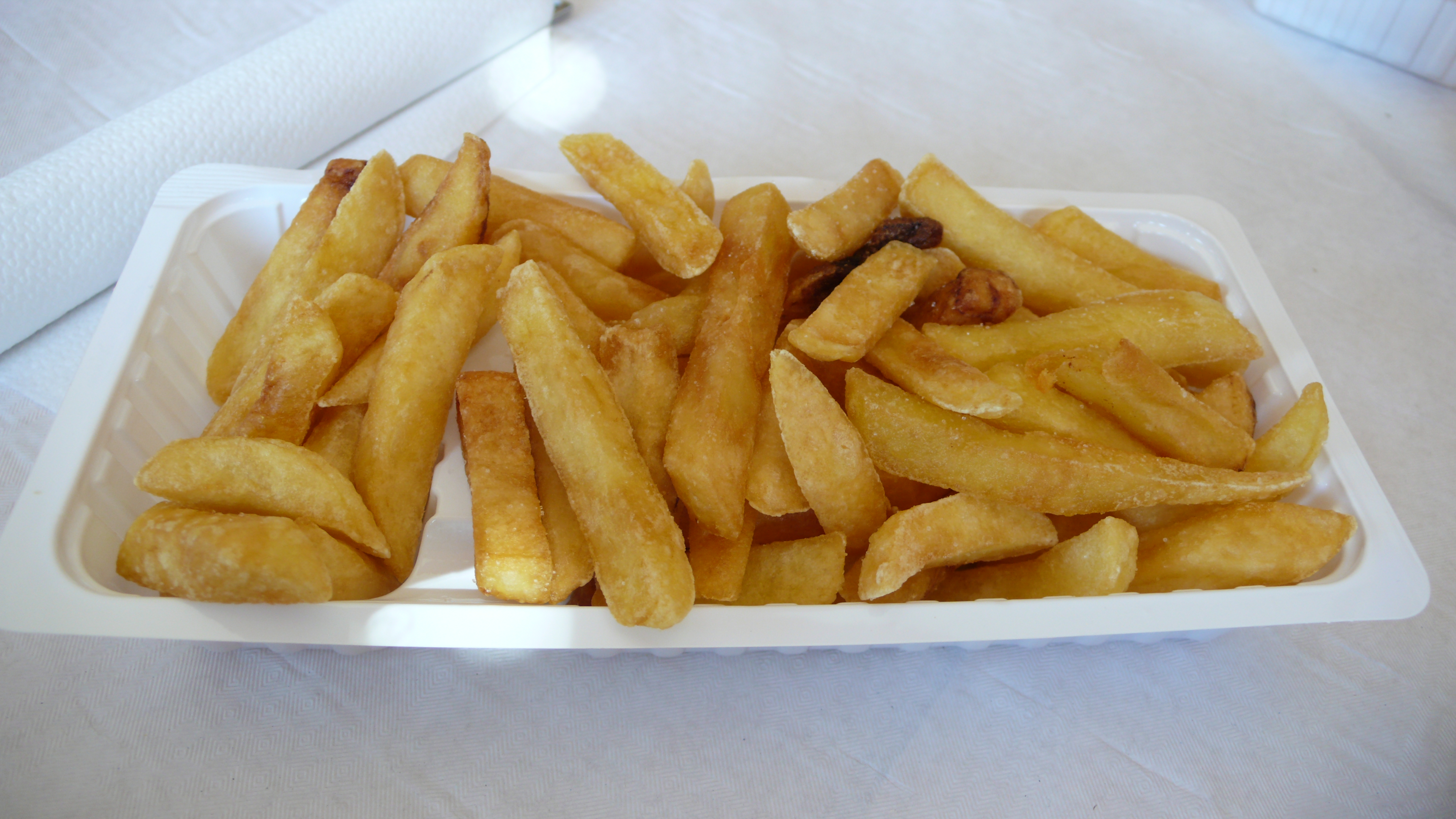 Fritten